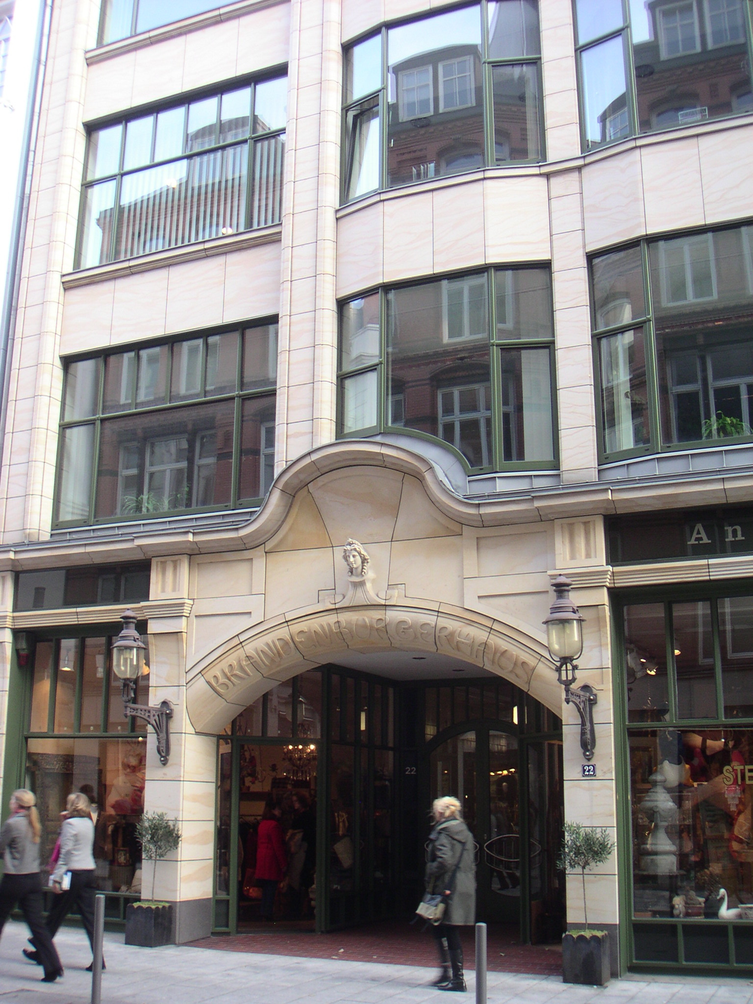 Hamburg, Kontorhaus "Brandenburgerhaus", Hohe Bleichen, Altstadt